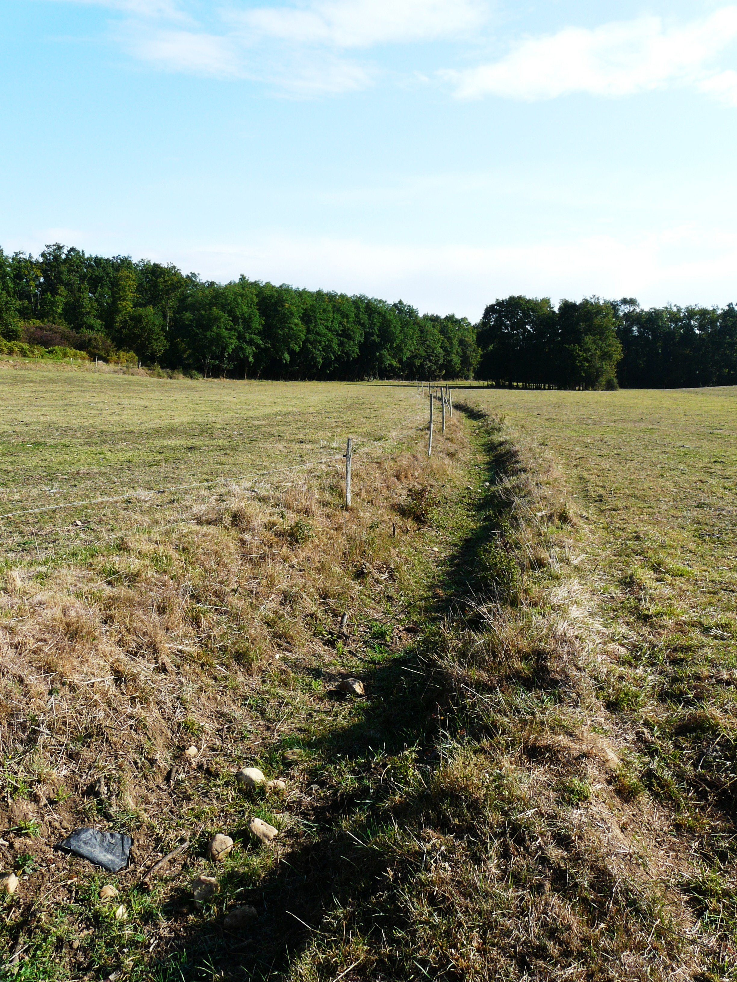 Le lit asséché de la Beauronne entre Fontamiel et Les Rebières, Sorges, Dordogne, France